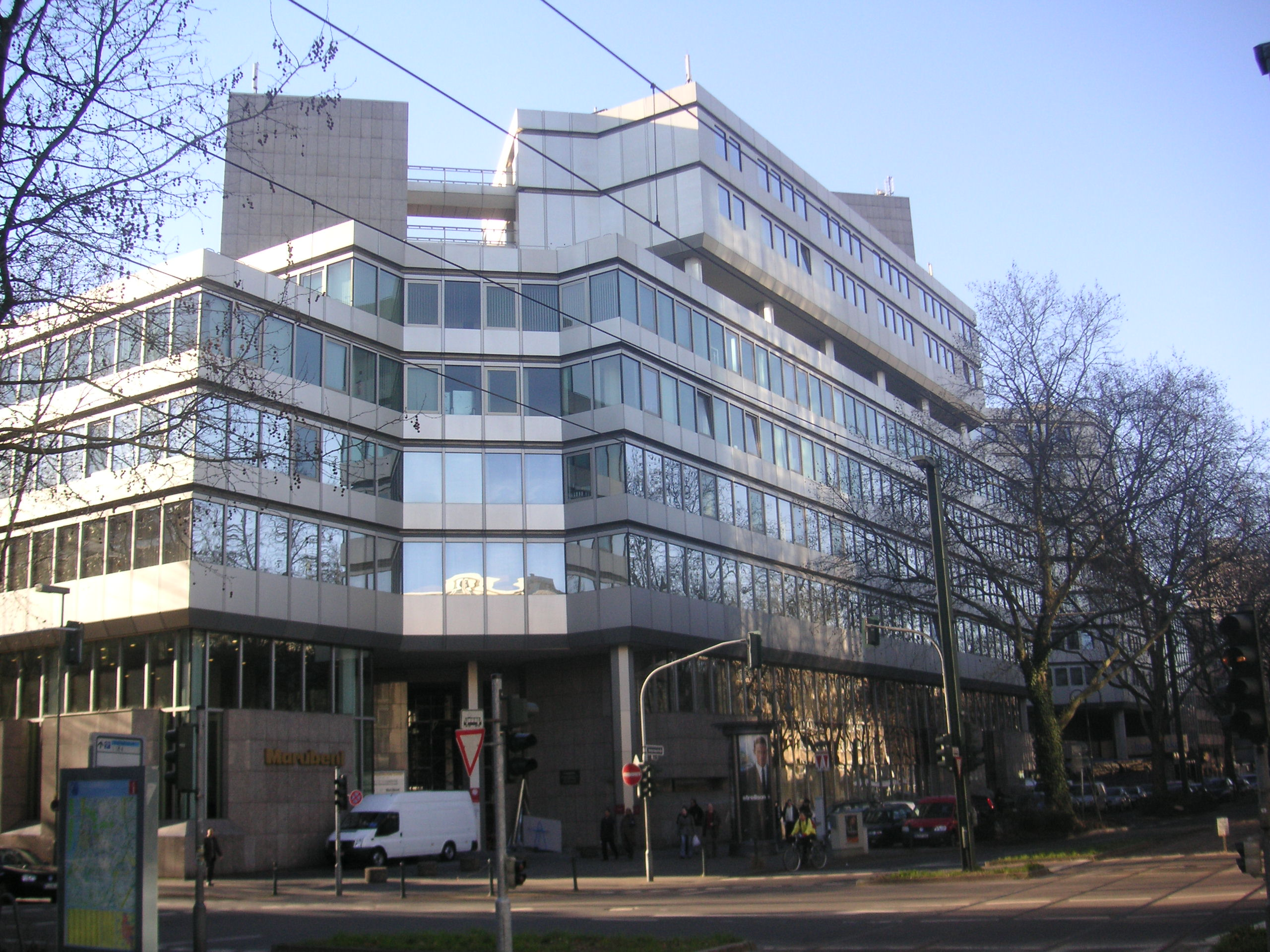 Japan Center Düsseldorf